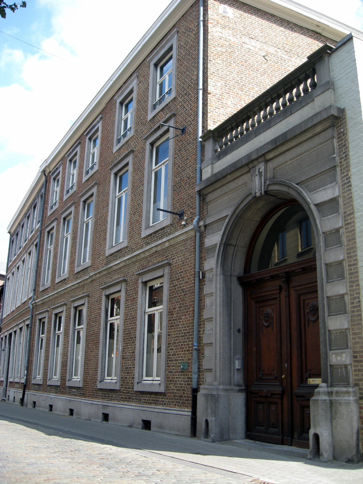 Hotel de Corswarem, voormallig Stedelijk Muziekconservatorium in Hasselt